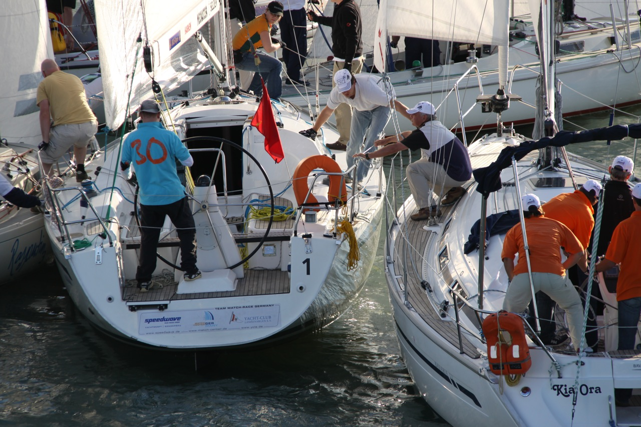 Rundum 2010 - kein Wind am Startschiff